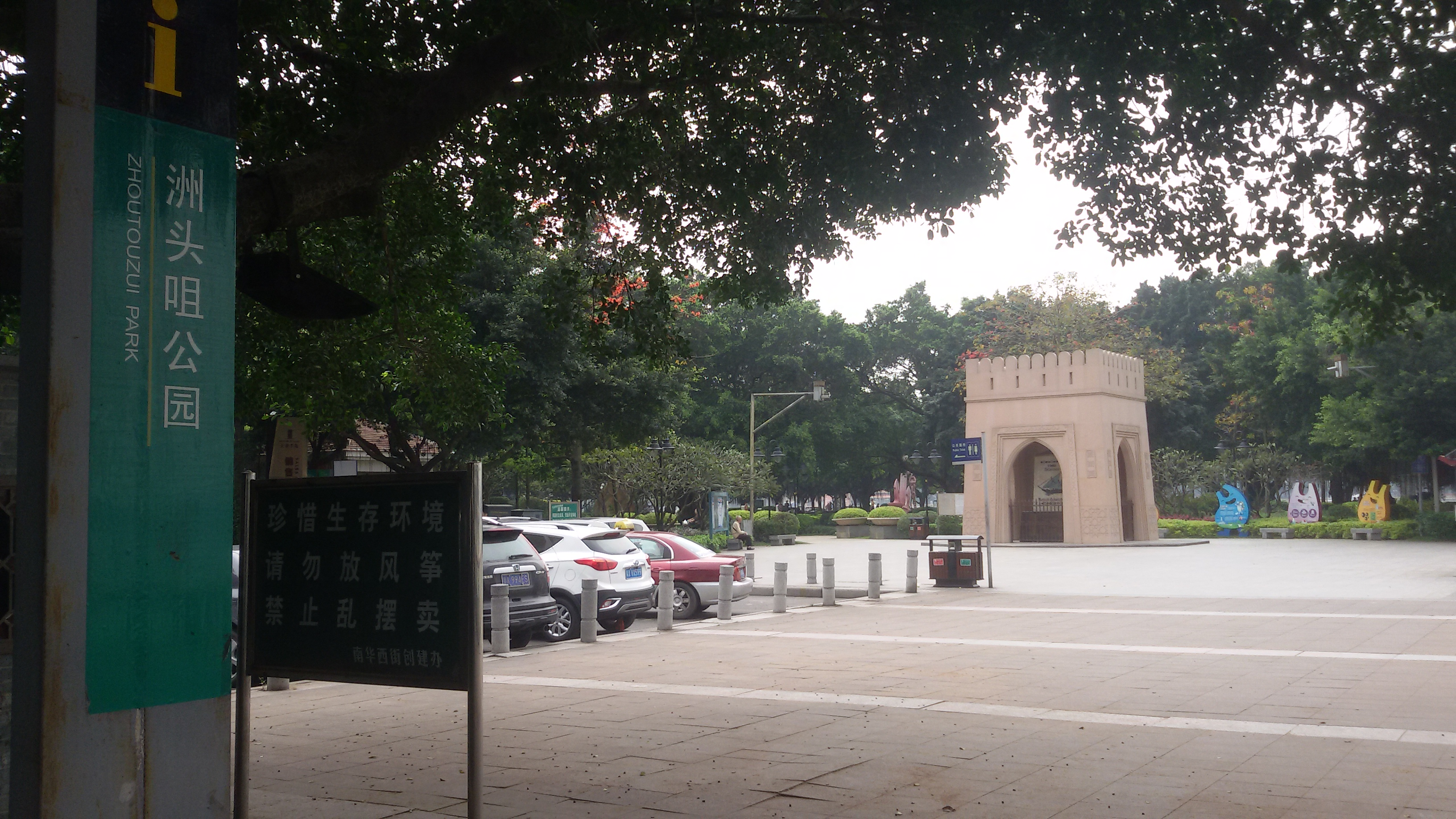 粵語: 洲头咀公园正门出面嘅大广场嗰度